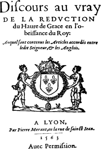 Cover page Discours au vray de la réduction du Havre de Grâce en l'obeissance du Roy Lyon, Pierre Merant, 1563